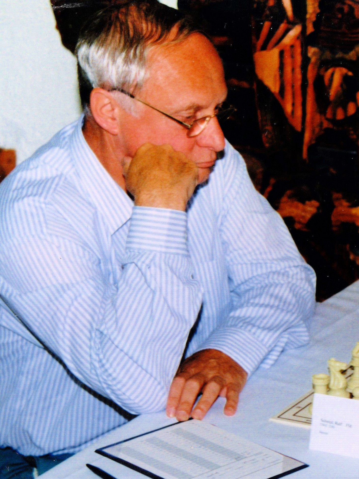 Ralf Scheipl, Deutsche Seniorenmeisterschaften 1996 im Schach in Friedrichroda.